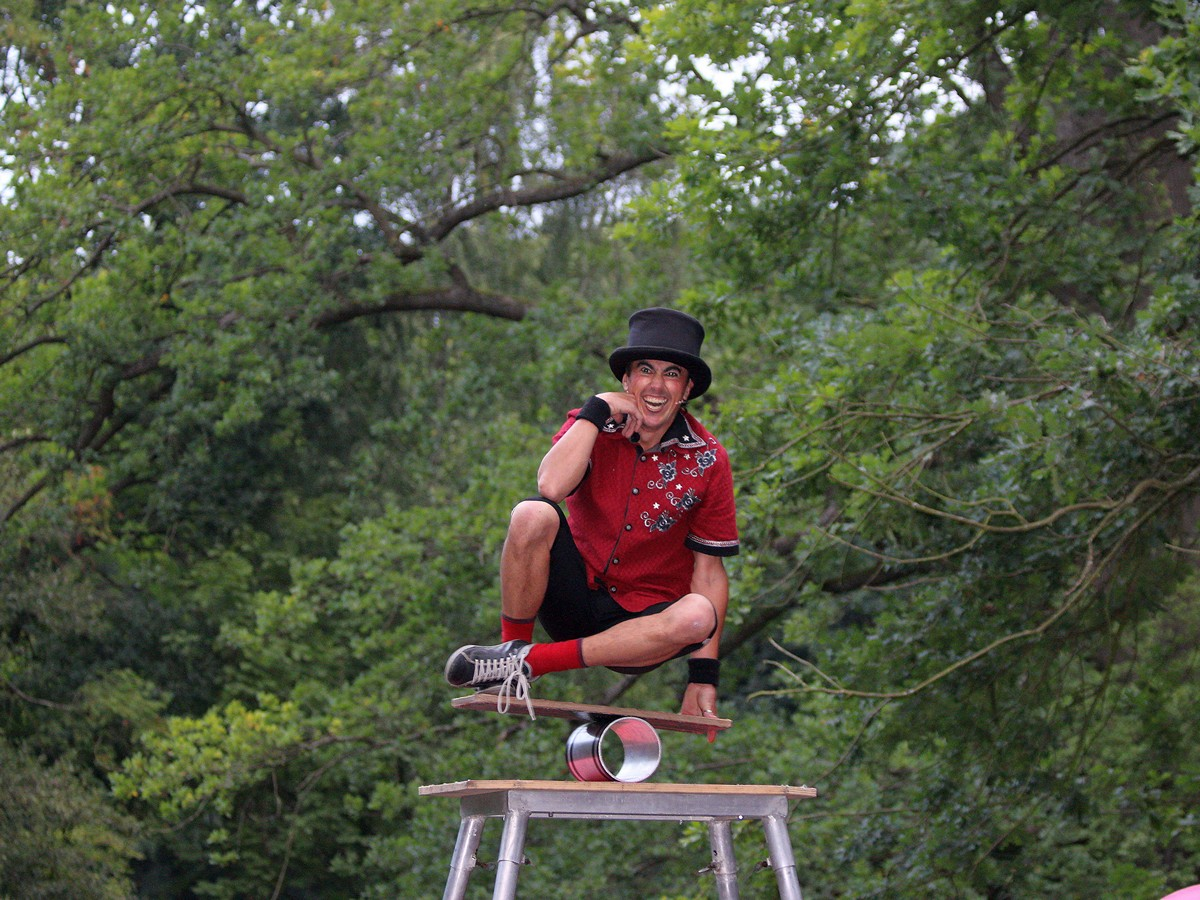 Rafael Dante in artistischer Balance beim Kleinen Festival in Ludwigslust, Mecklenburg. [1]